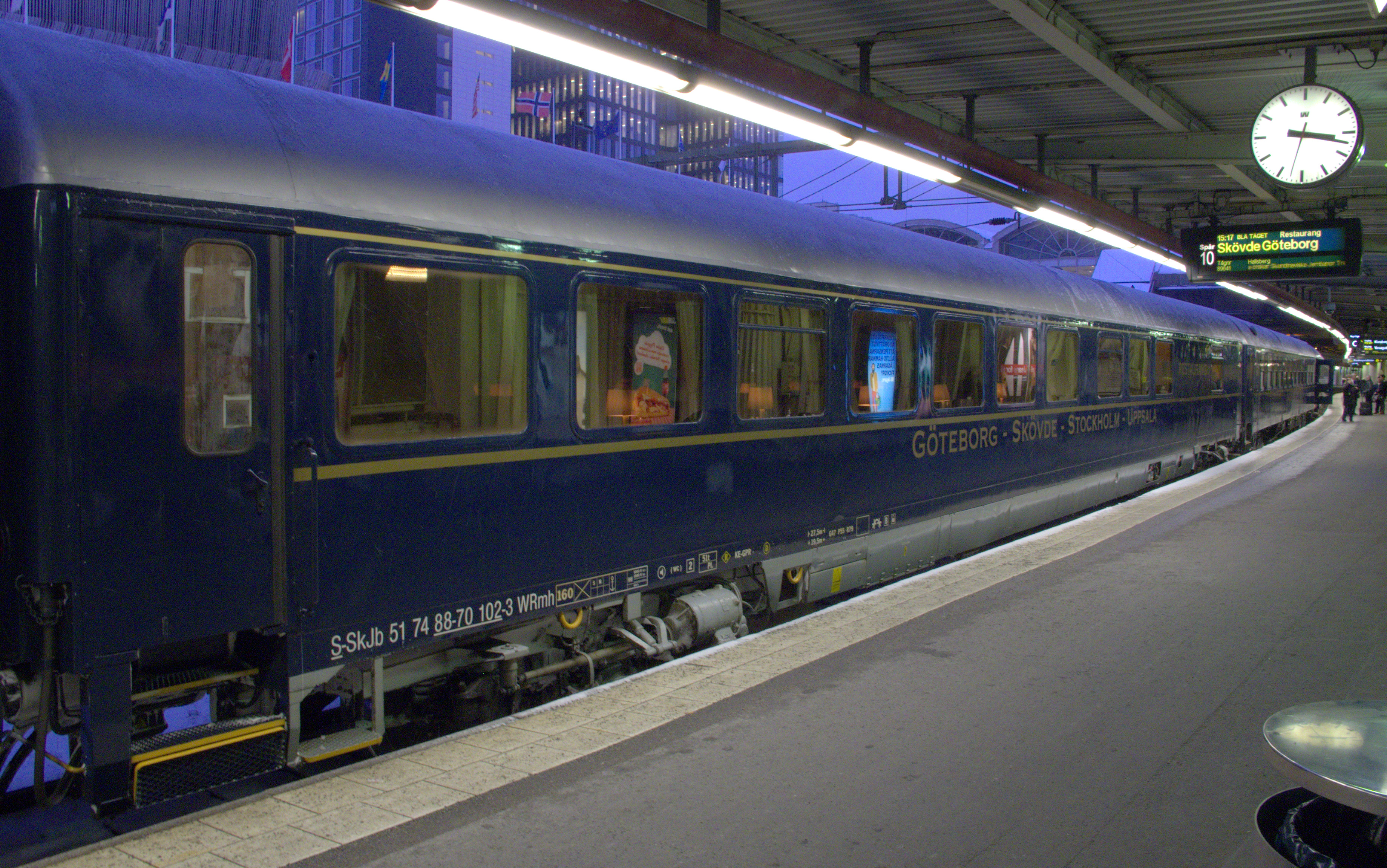 Blå tåget skall avgå från Stockholms central mot Göteborg.